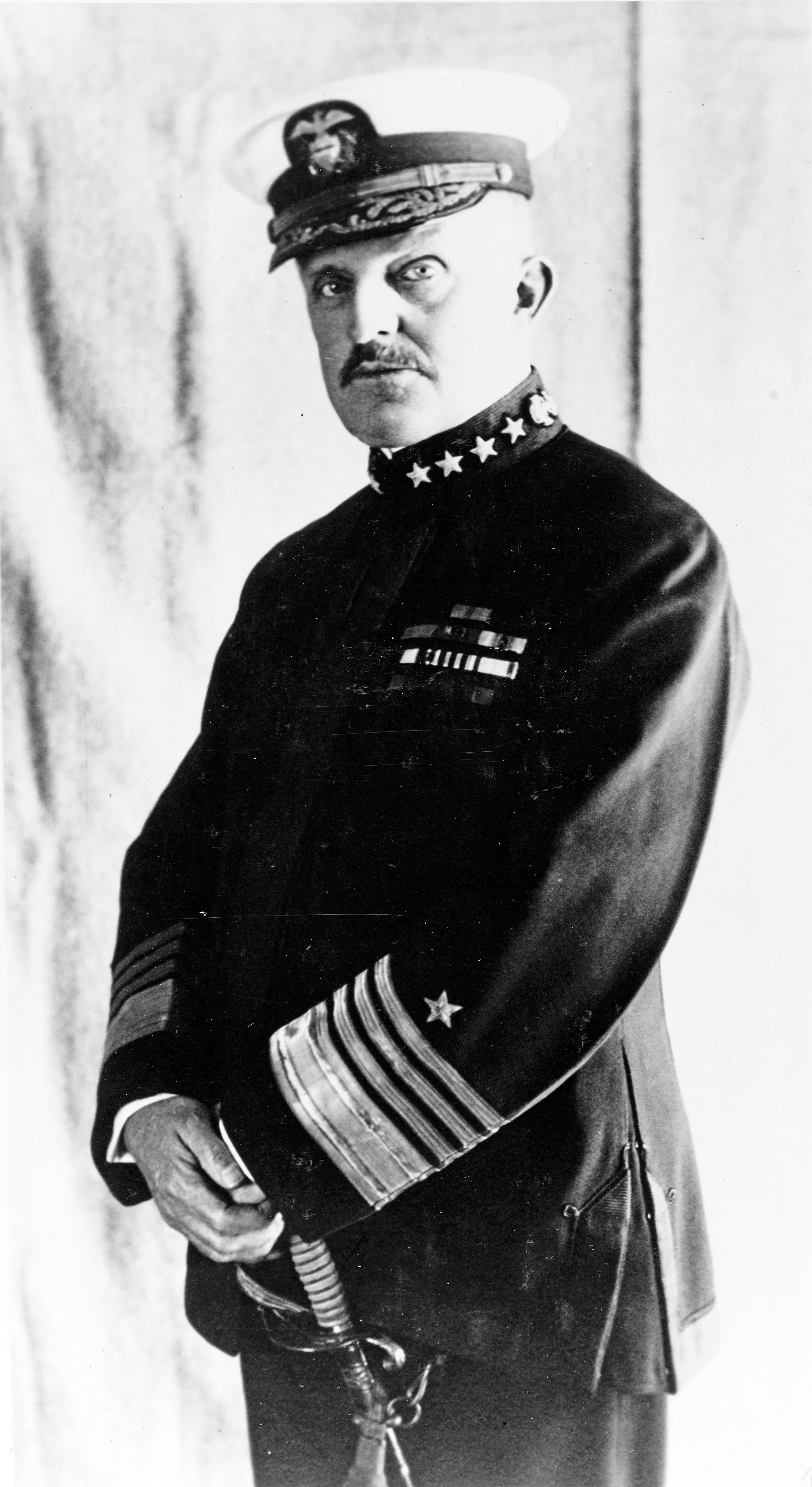 Albert Gleaves à Boston en 1921.